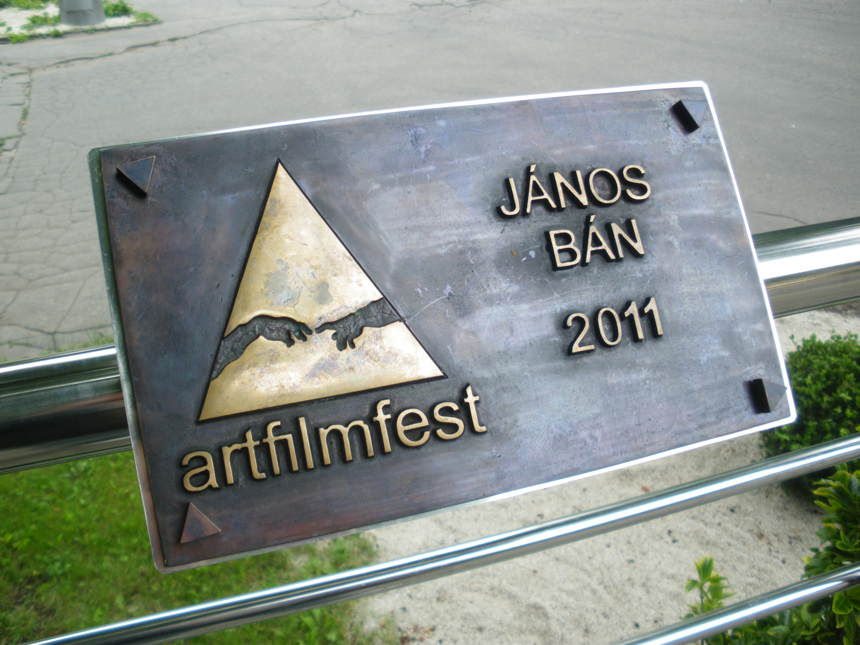 18. 6. 2011. Mosadzná plaketa: „HERCOVA MISIA“ (Actor‘s Mission Award). Medzinárodný filmový festival Art Film Fest, Trenčianske Teplice.